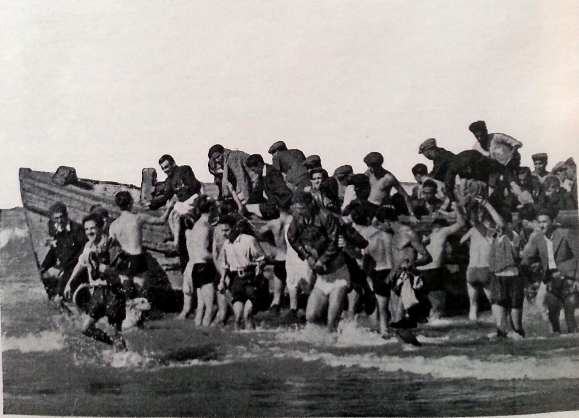 מעפילי טייגר היל בחוף תל אביב, 1939